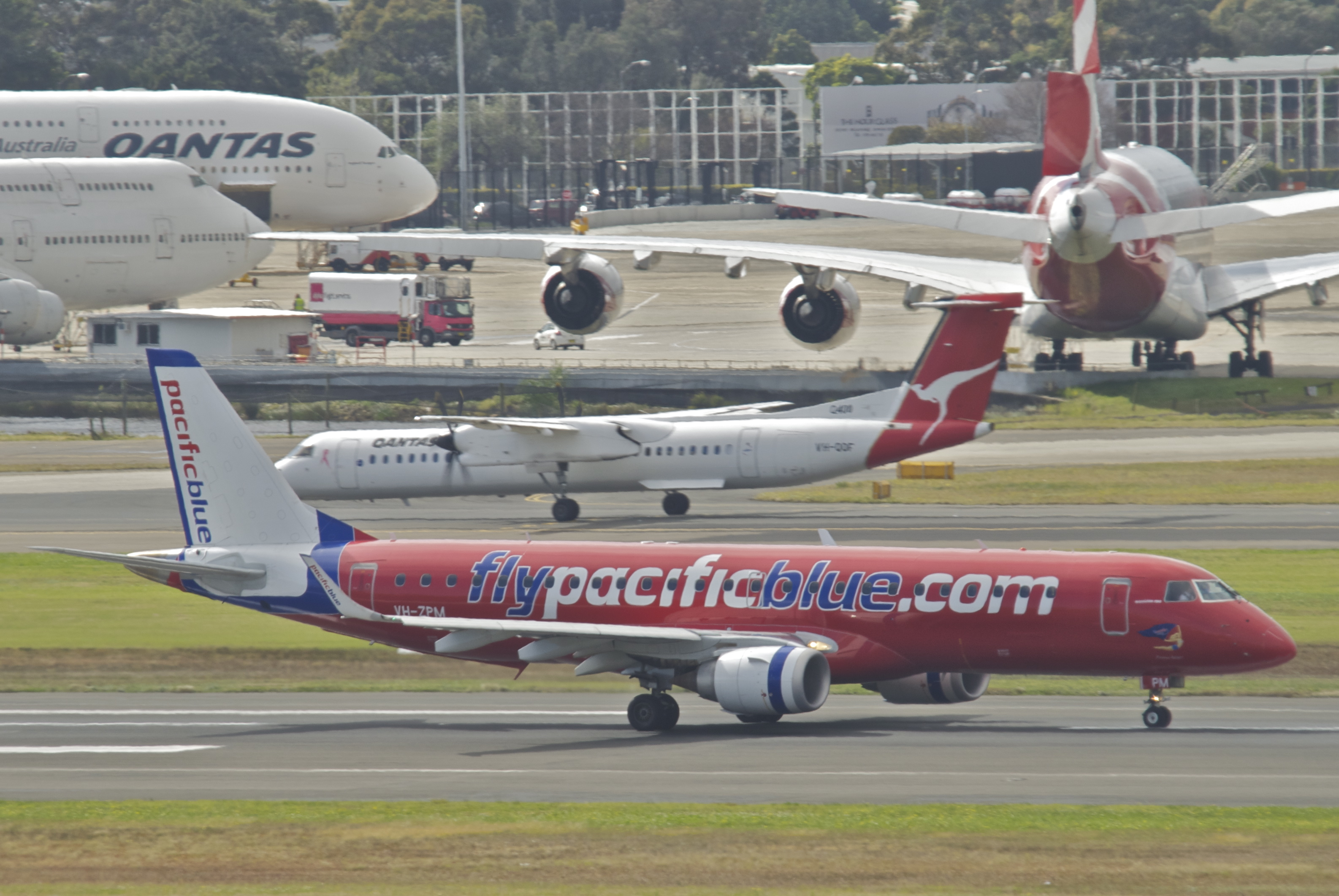 Pacific Blue Embraer ERJ190; VH-ZPM@SYD;31.07.2012/666gc